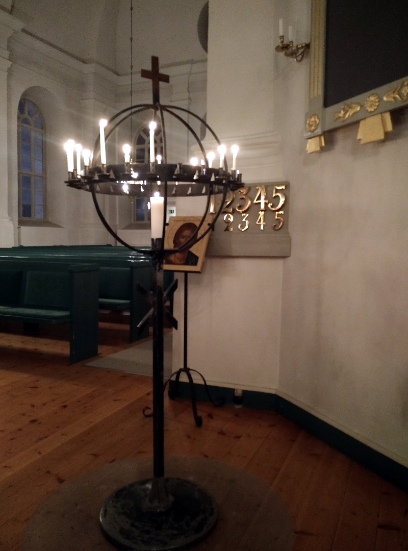 Ljusbärare framför Jesusikon, Landskyrkan, Skellefteå Pastorat, Luleå Stift.